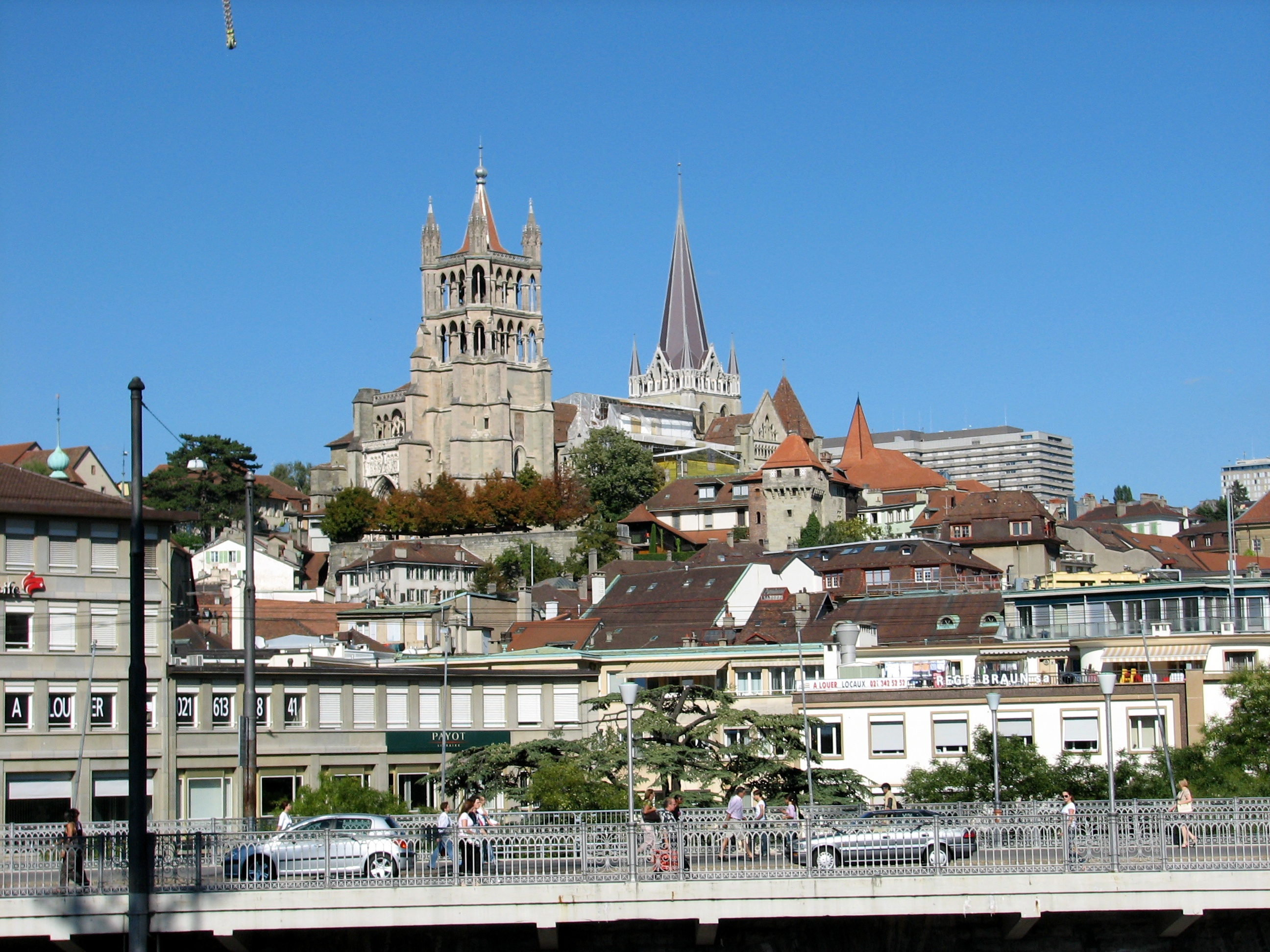 Die Kathedrale von Lausanne Ã¼ber der Stadt.